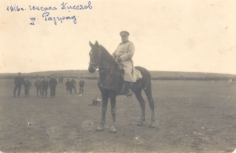 Портрет на генерал Пантелей Киселов от 9 февруари 1916 г. Генералът е предводител на 8-ми Пехотен приморски полк в Балканската война.